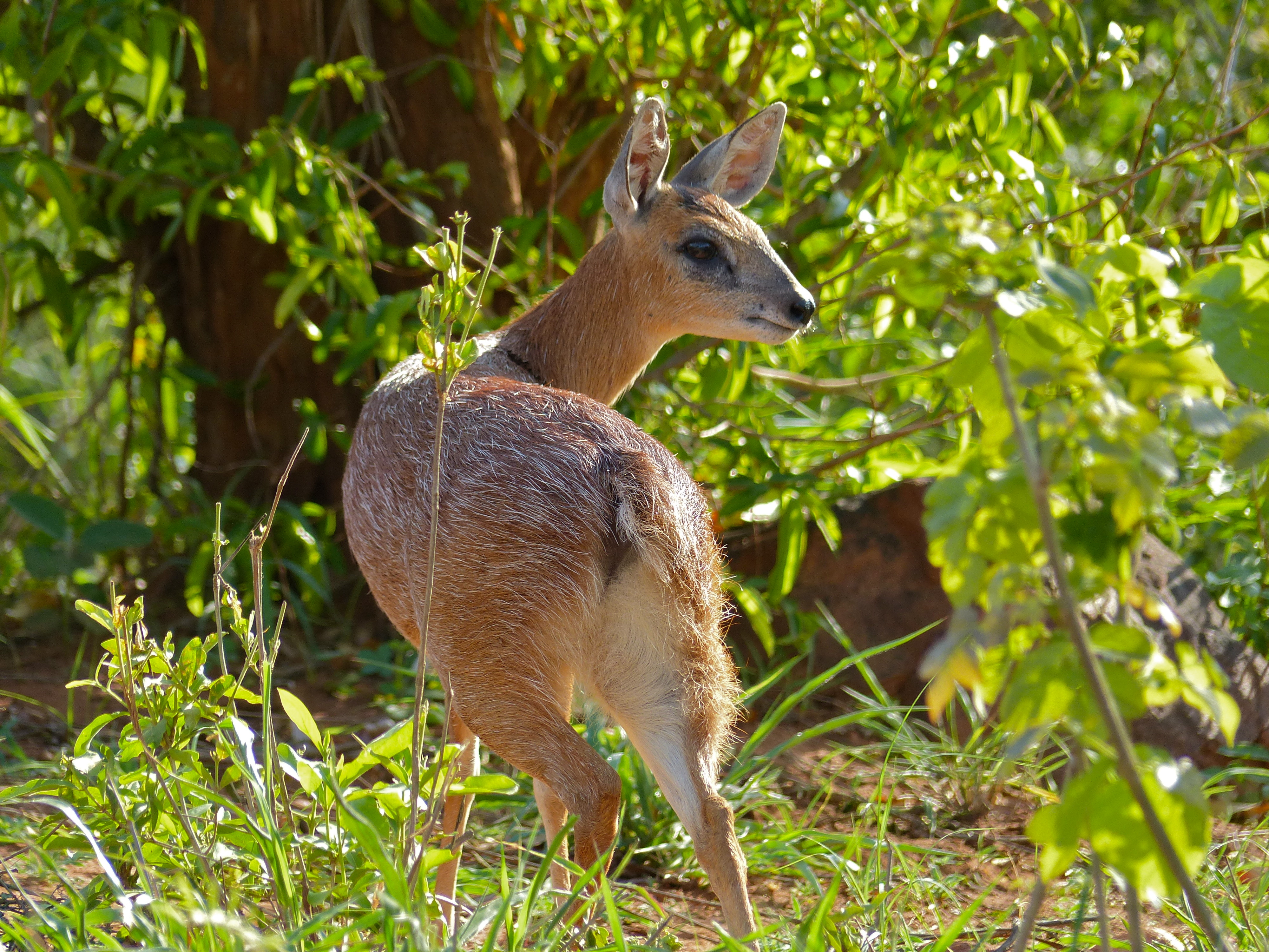 Mahonie Loop near Punda Maria, Kruger NP, SOUTH AFRICA